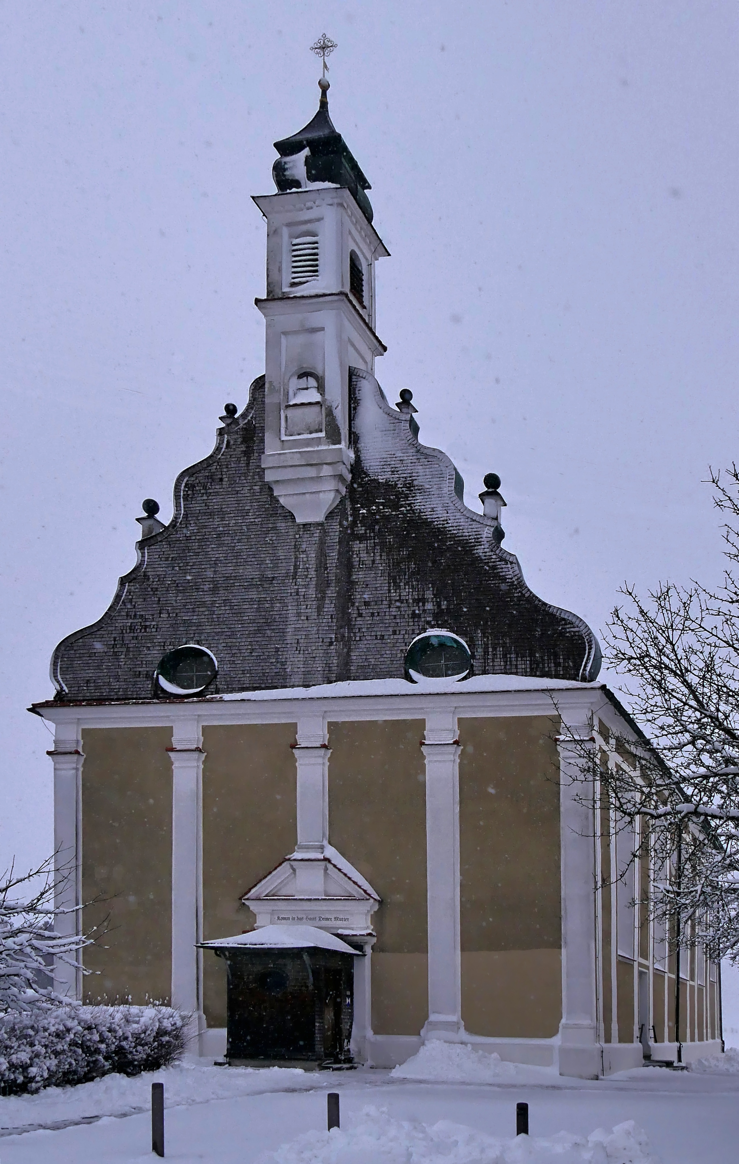 Wallfahrskapelle Maria Schnee in Lehenbühl bei Legau - Aussenansicht im Winter